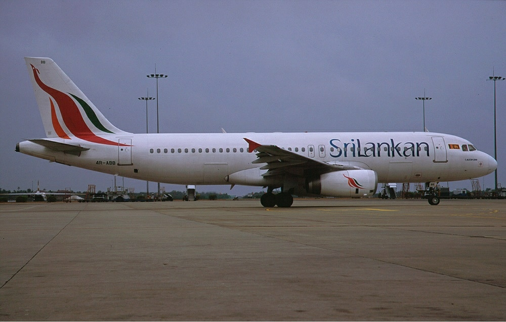 SriLankan Airlines Airbus A320-231 @ CMB